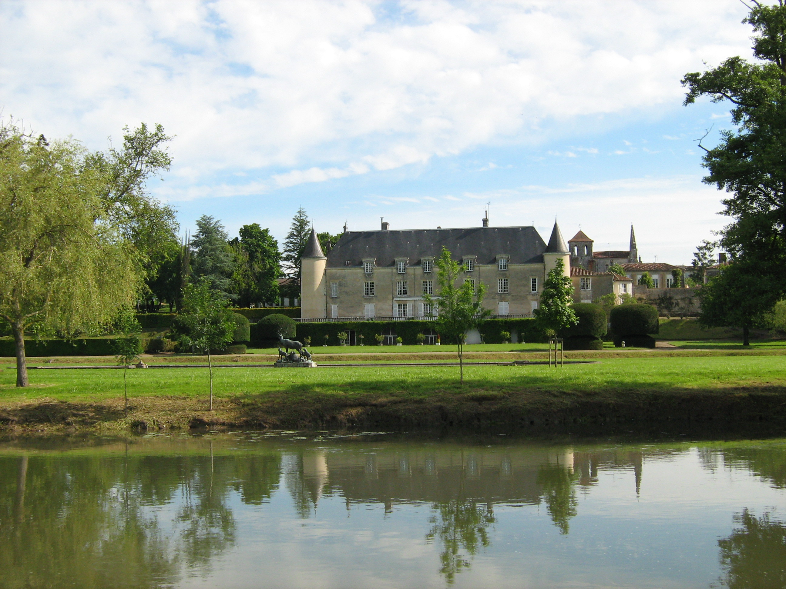 Das Schloss von Saint-Brice am Ufer des Flusses Charente